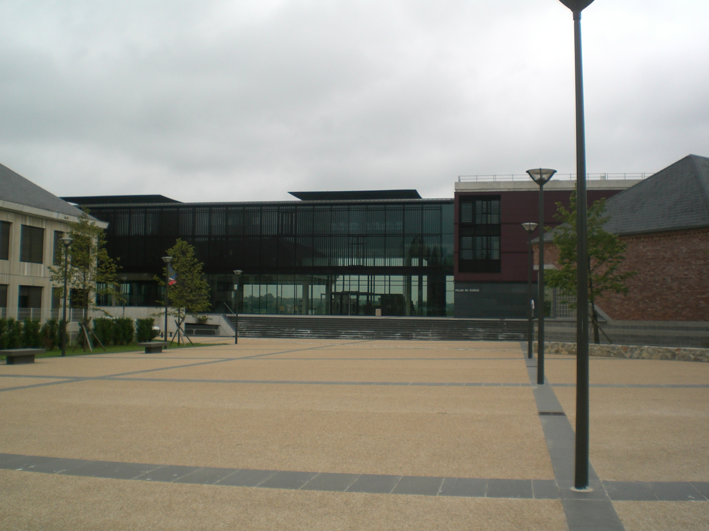 tribunal d'Avesnes sur help nord france